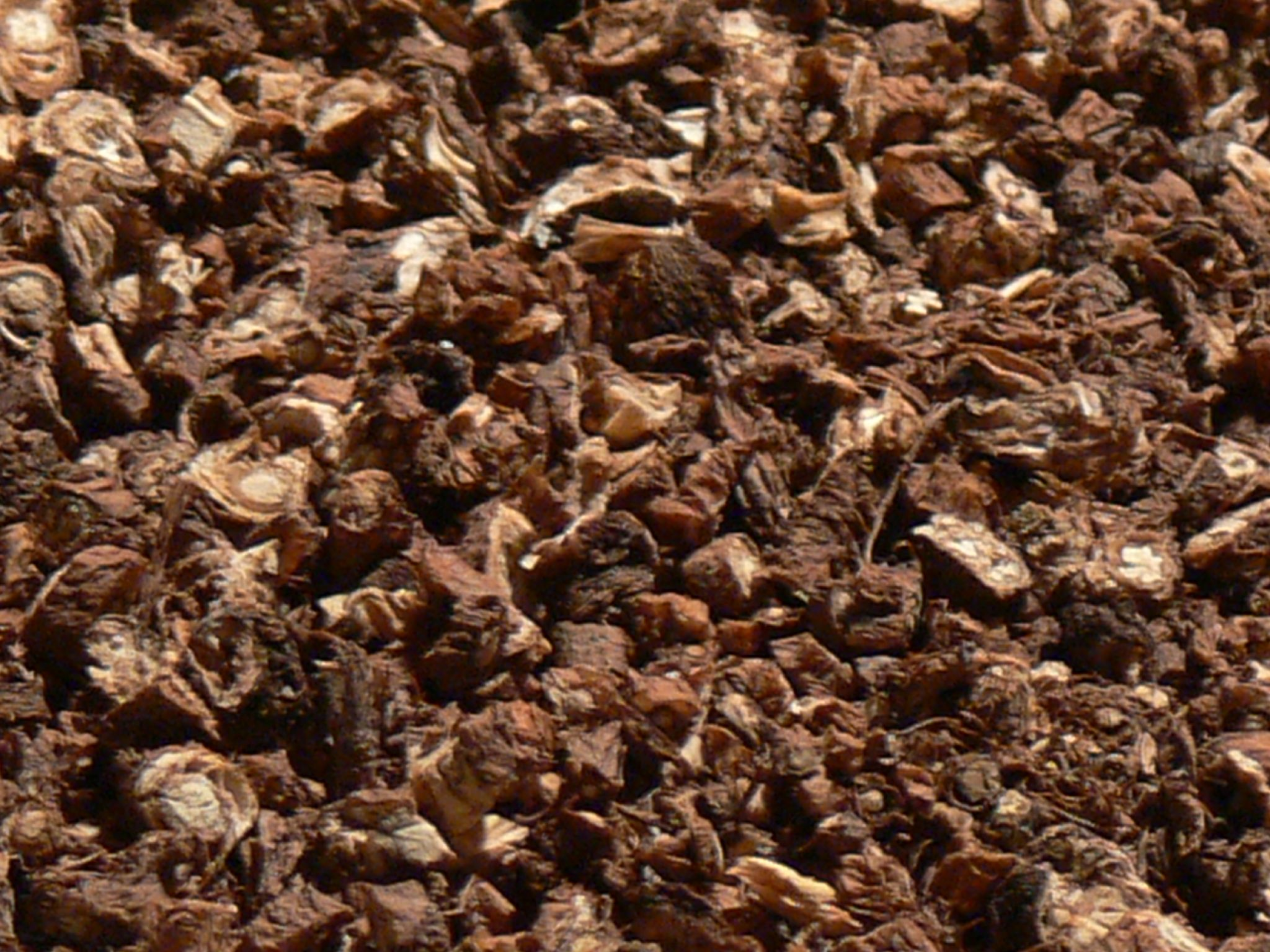 Roasted dandelion root